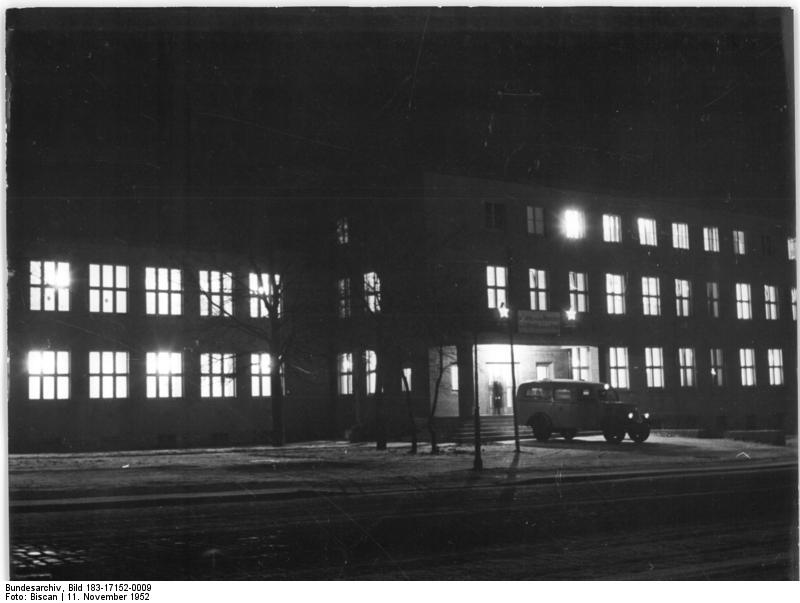 Zentralbild-Biscan Kno-Ho. 11.11.1952 Magdeburg bei Nacht Blick auf die Pawlow-Poliklinik, die in unmittelbarer Nähe der Schwermaschinen-Betriebe zur Betreuung der Werktätigen errichtet wurde.